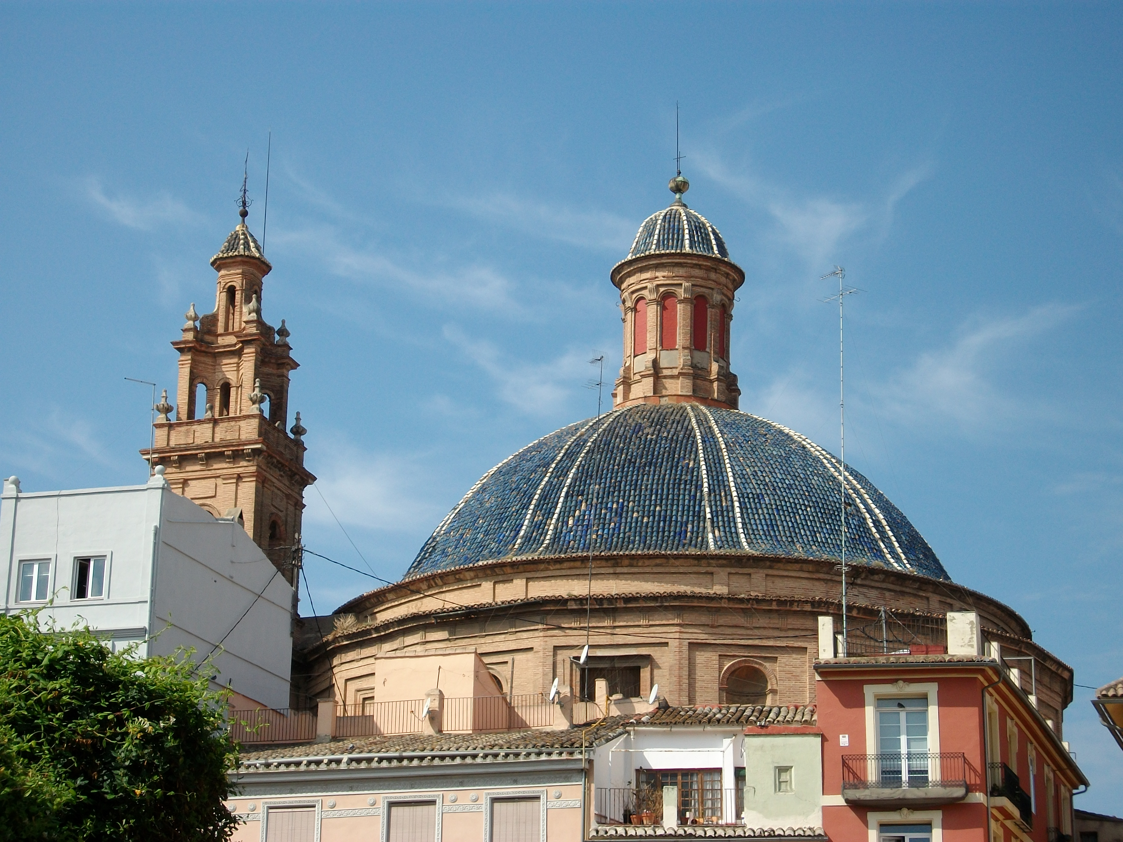 Vista exterior de la cúpula de l'església de les Escoles Pies de València, barri de Velluters.